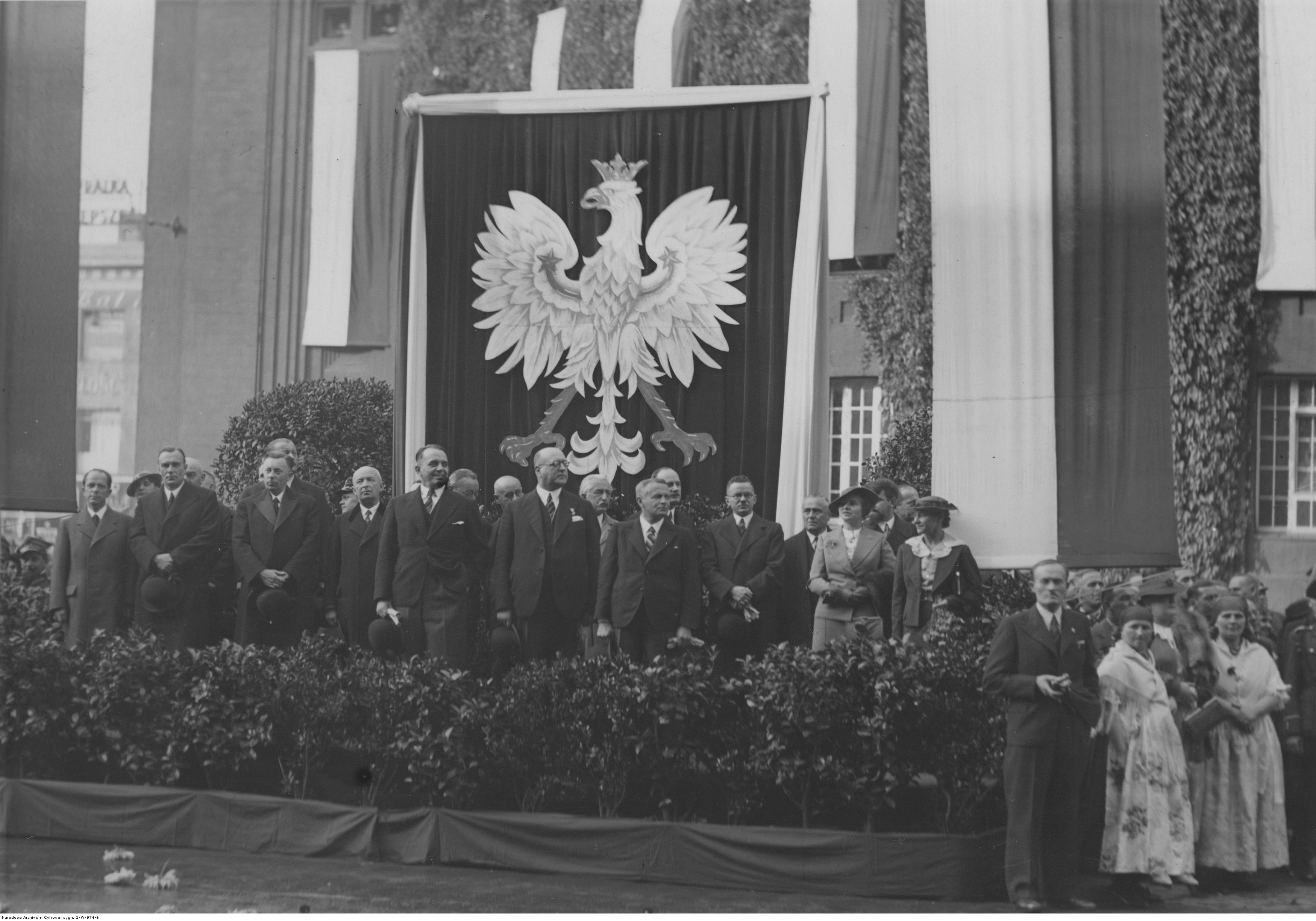 Powitanie w Katowicach 23 Górnośląskiej Dywizji Piechoty powracającej z manewrów. Defilada na ulicy marszałka Józefa Piłsudskiego - widoczna trybuna honorowa. Na pierwszym planie od lewej: prezydent Adam Kocur, marszałek Karol Grzesik, wojewoda Michał Grażyński. Koncern Ilustrowany Kurier Codzienny - Archiwum Ilustracji. Sygnatura: 1-W-974-6